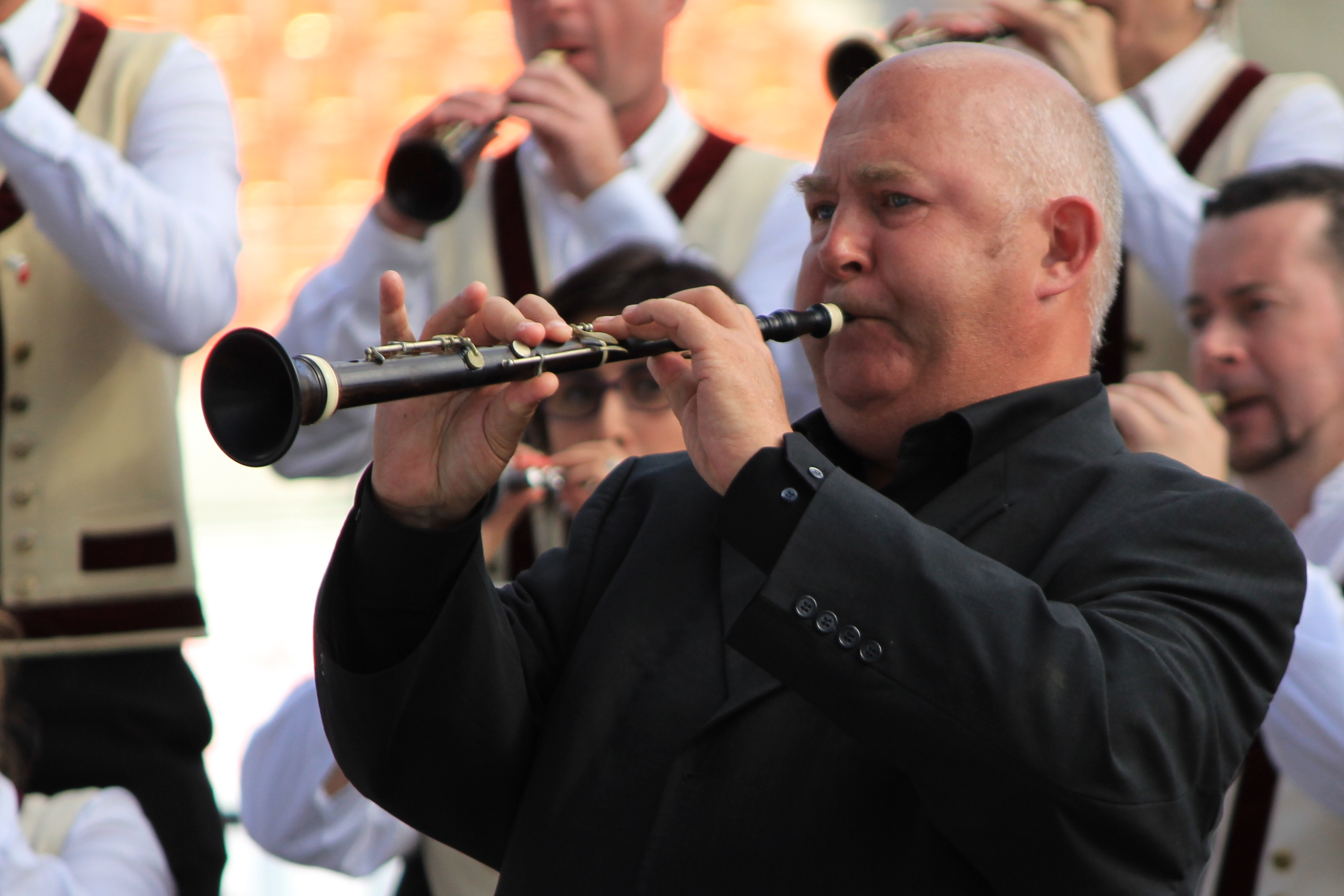 Le Bagad Elven lors de l'épreuve de Lorient du championnat national des bagadoù organisée dans le cadre du festival interceltique de Lorient 2013.